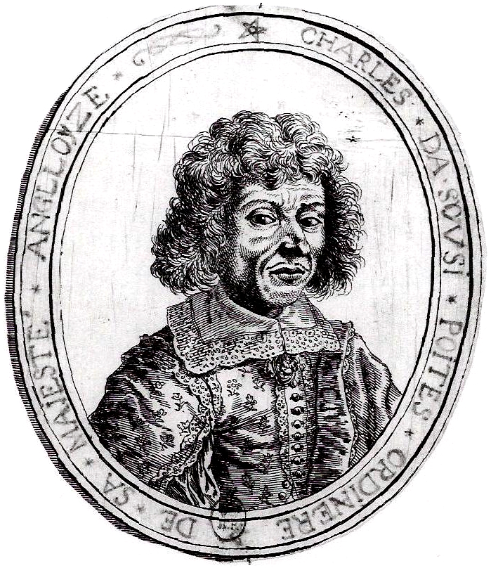 D'Assoucy dans les années 1630